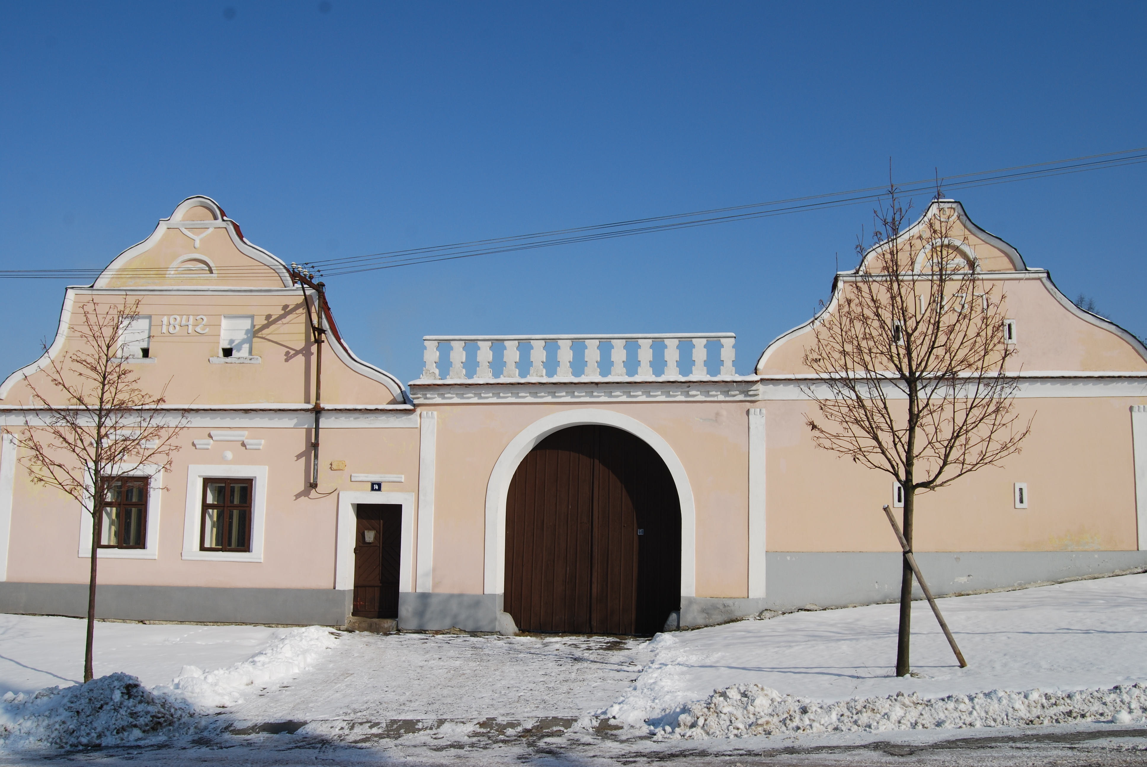 Usedlost čp. 14 v obci. Ražice. Okres Písek. Česká republika.